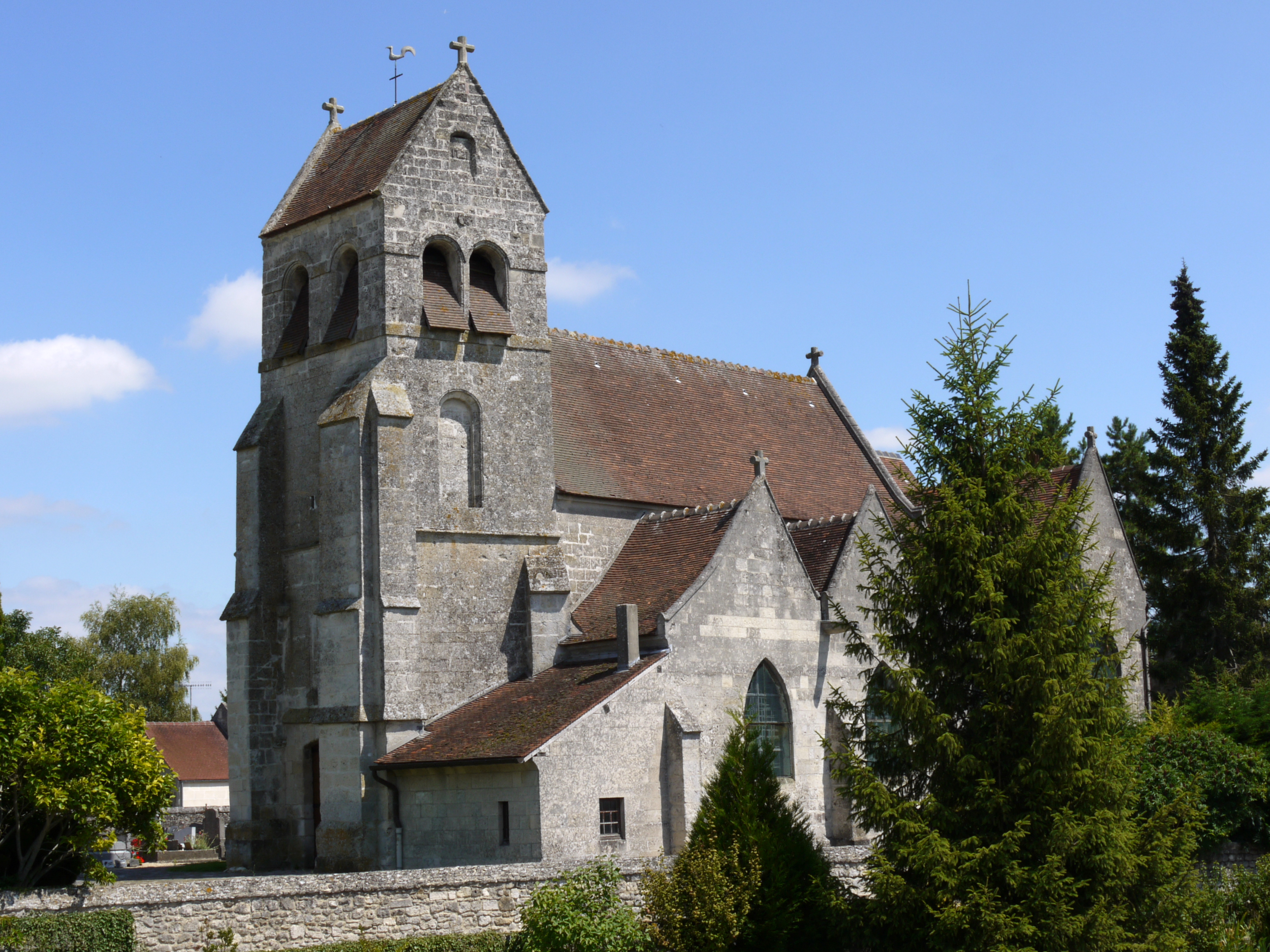 Eglise de Saint-Étienne-Roilaye, Oise, France